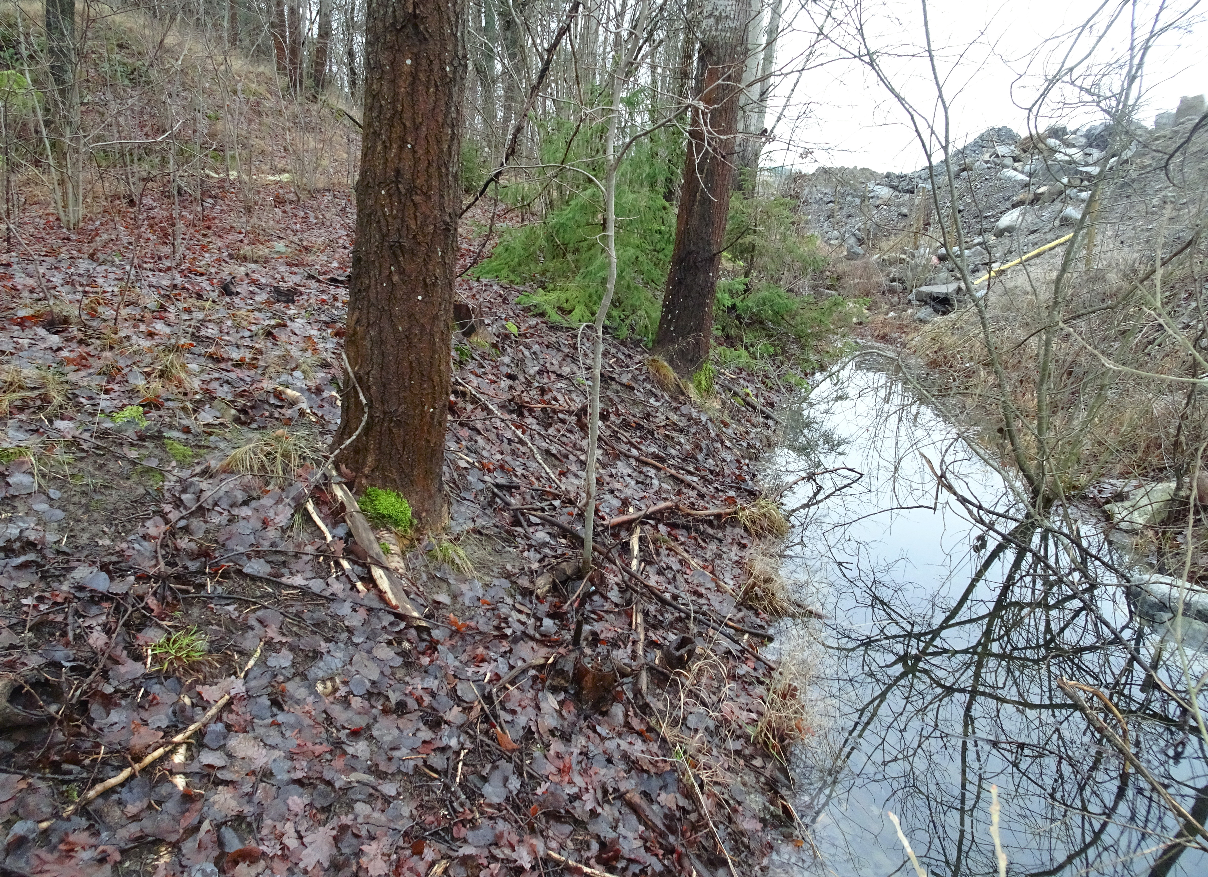 Kungens Kurva, Kungens bilolycka, diket där Gustaf V hamnade den 28 september 1946